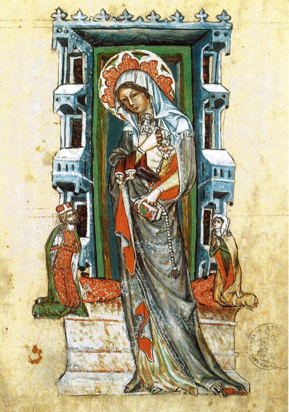 Miniatur, 1353, Schlackenwerther Codex, die erste deutsche Übersetzung der Hedwigslegende